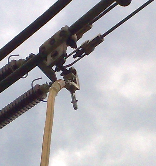 in 110 kV-Abgang eingehangene Erde, Anschluss Kugelkopf, Erdungsstange entfernt